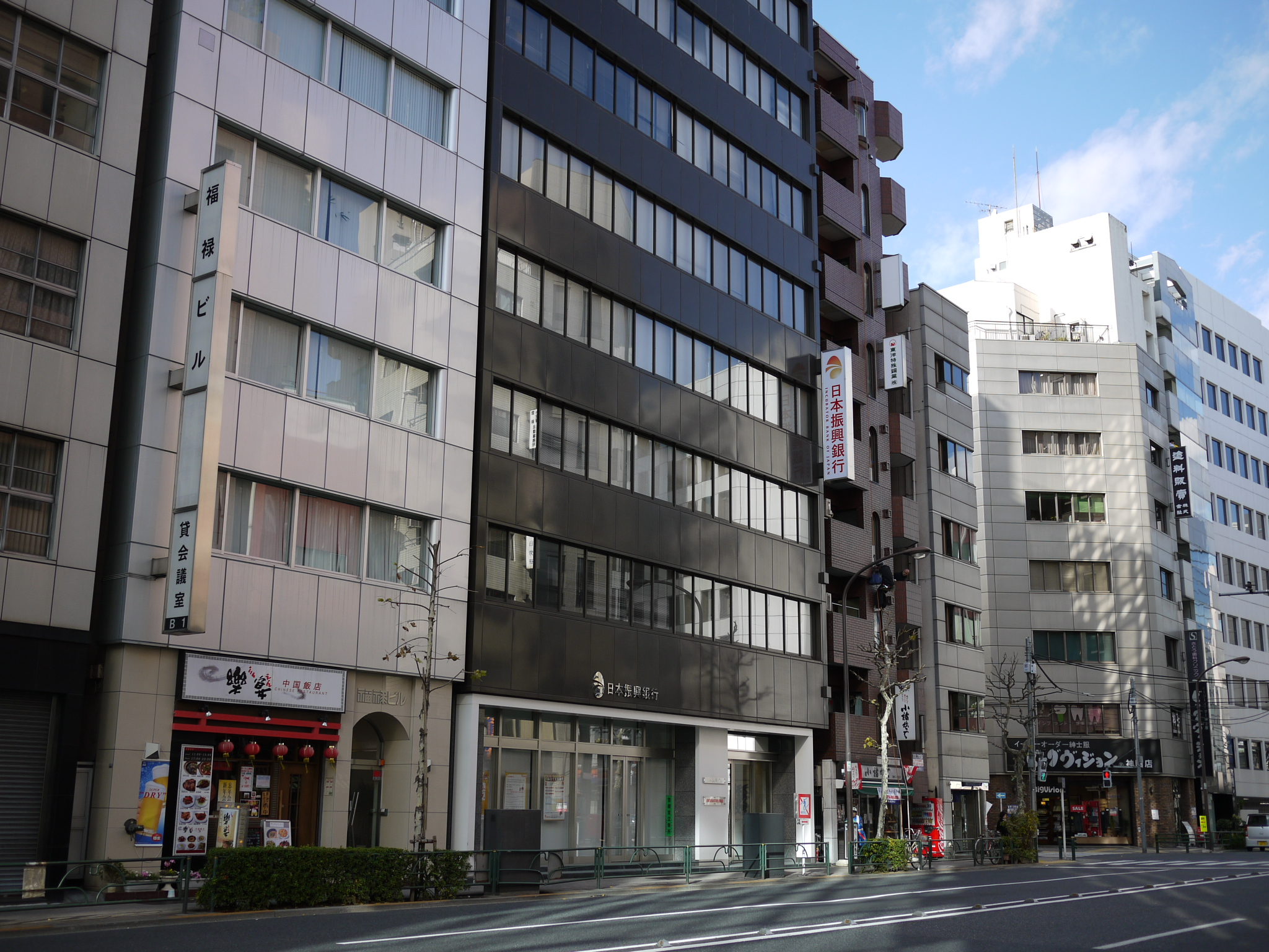 日本振興銀行本店の入る日本振興ビル。